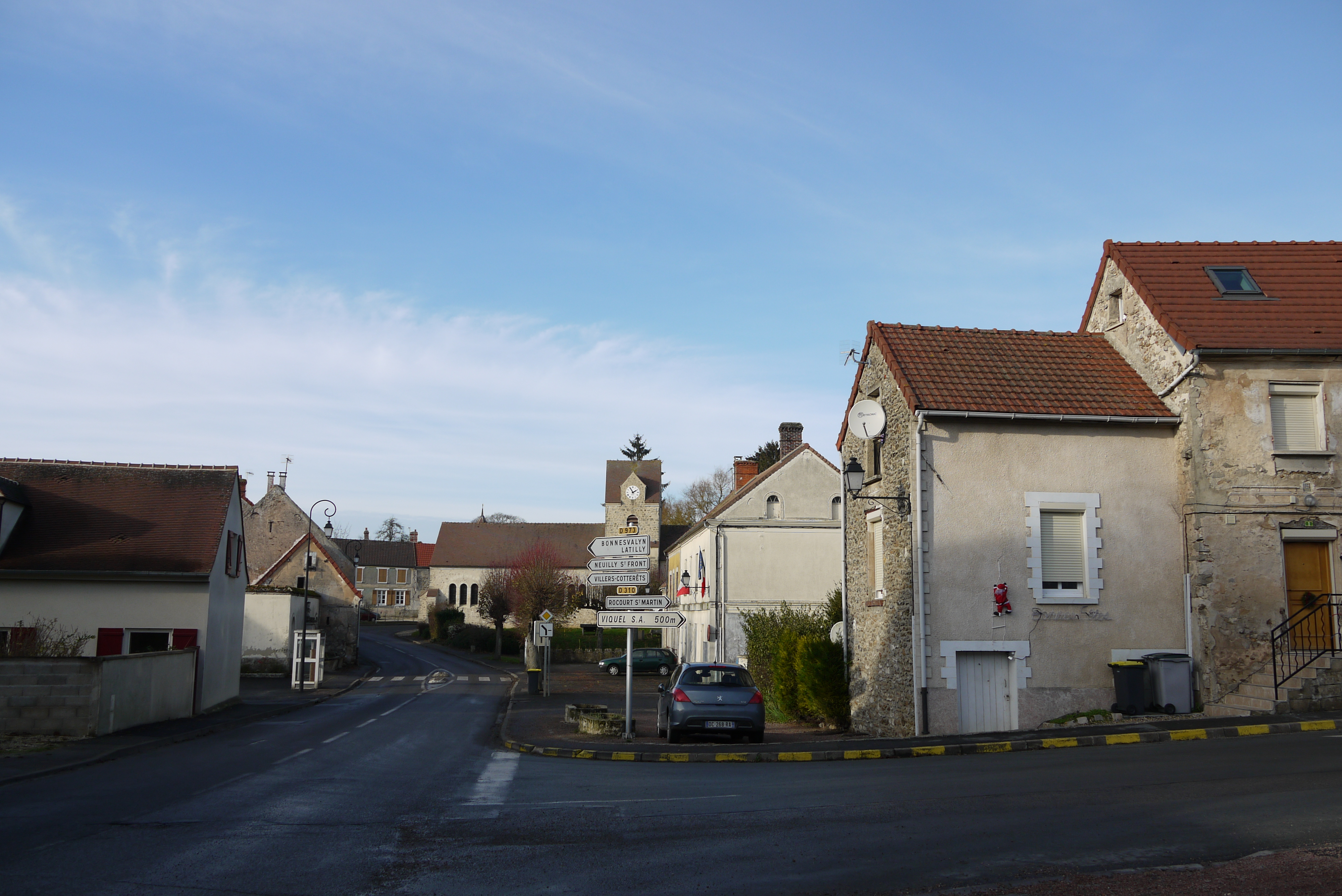 L'axe principal de Grisolles.